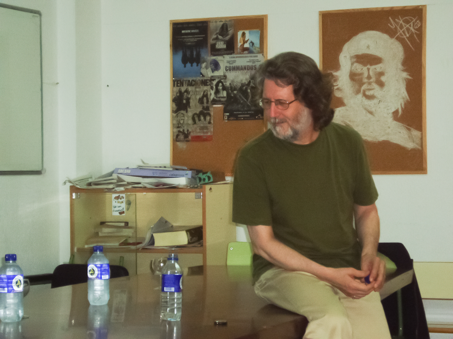 José Antonio Perozo (Q20534600)